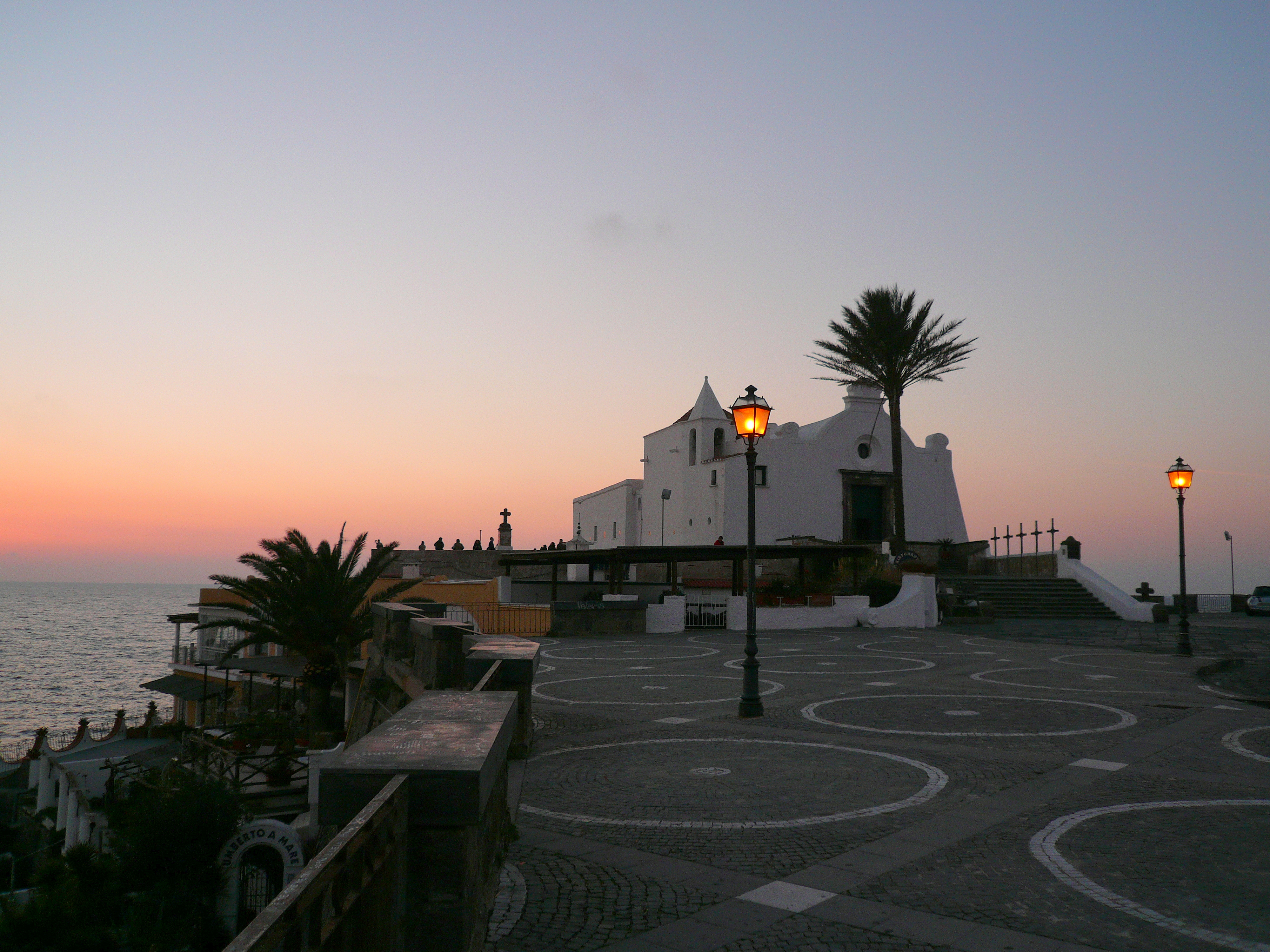 crepuscolo sulla Chiesa del Soccorso di Forio (isola d'Ischia)